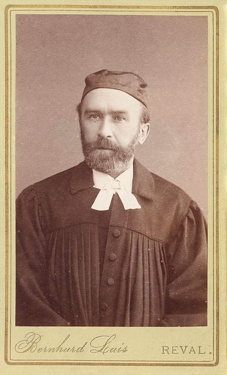 Carl Eduard Malm (1837-1901) Rapla pastor, Lääne-Harju praost